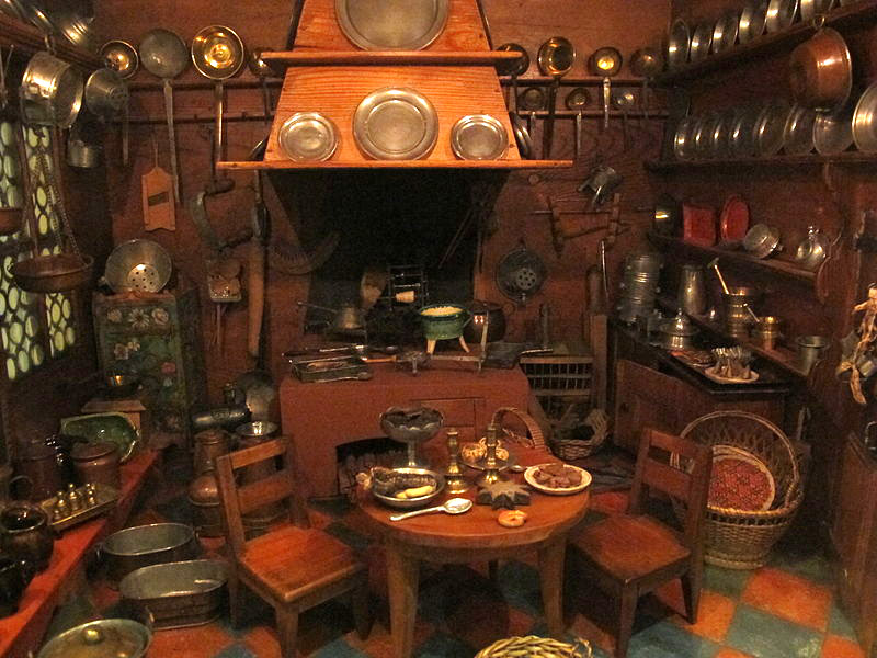 Casa di bambola della famiglia Bäumler di norimberga, 1650-1700 ca, 08 cucina